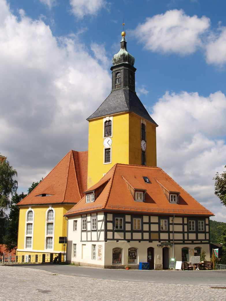 Church in Hohnstein (Landkreis Sächsische Schweiz), Germany image by varp September 2006